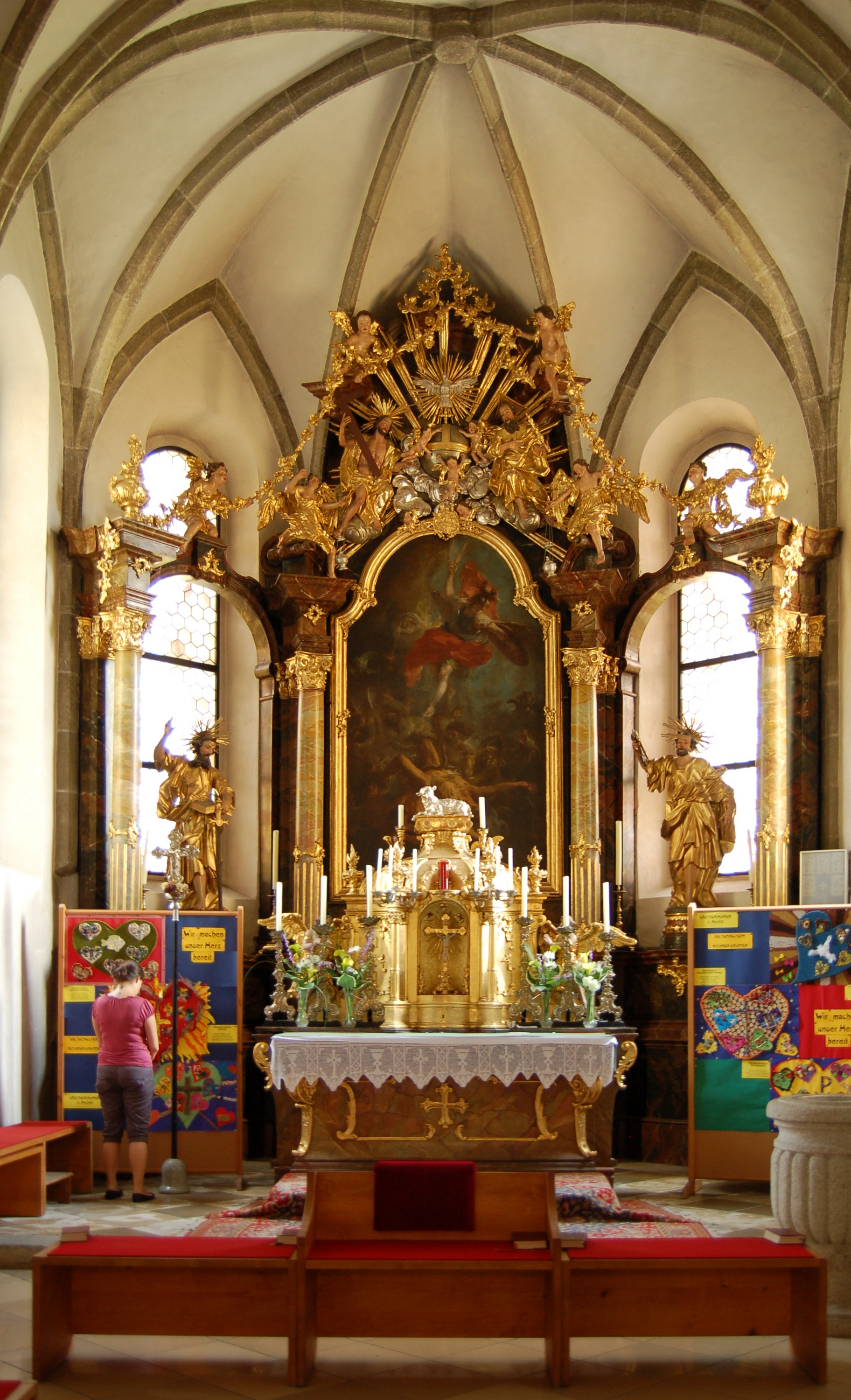 Die Pfarrkirche von Feldkirchen ist ein gotischer Kirchenbau mit einheitlicher Rokokoeinrichtung und freistehendem ehemaligen Wehrturm.